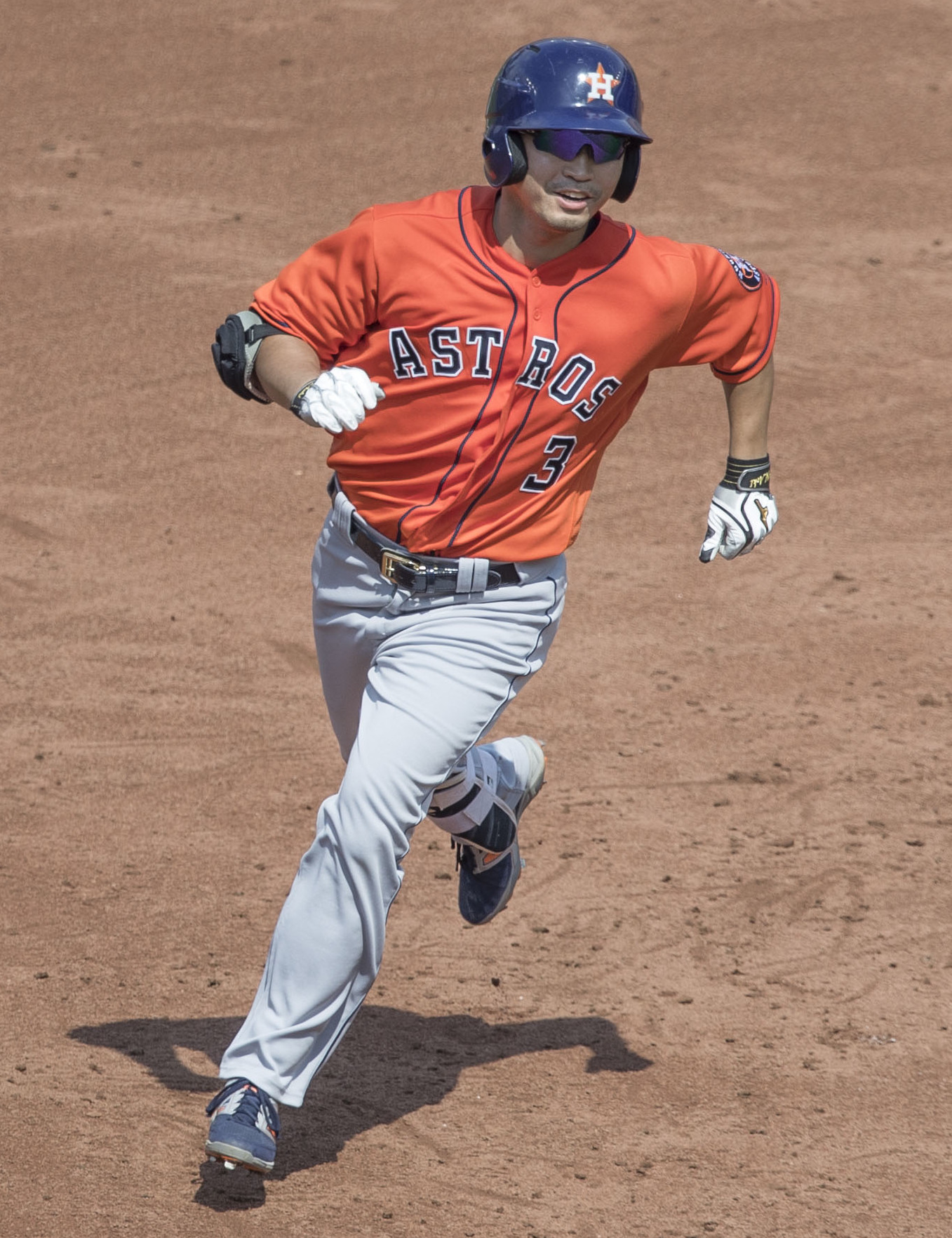 Astros at Orioles 7/23/17